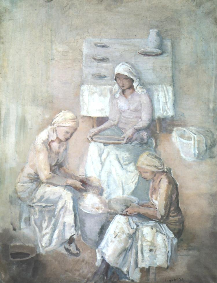 Białe